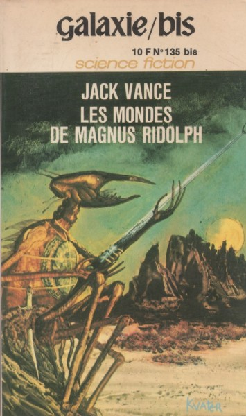 Illustration de couverture du roman de la collection Galaxie bis n°45